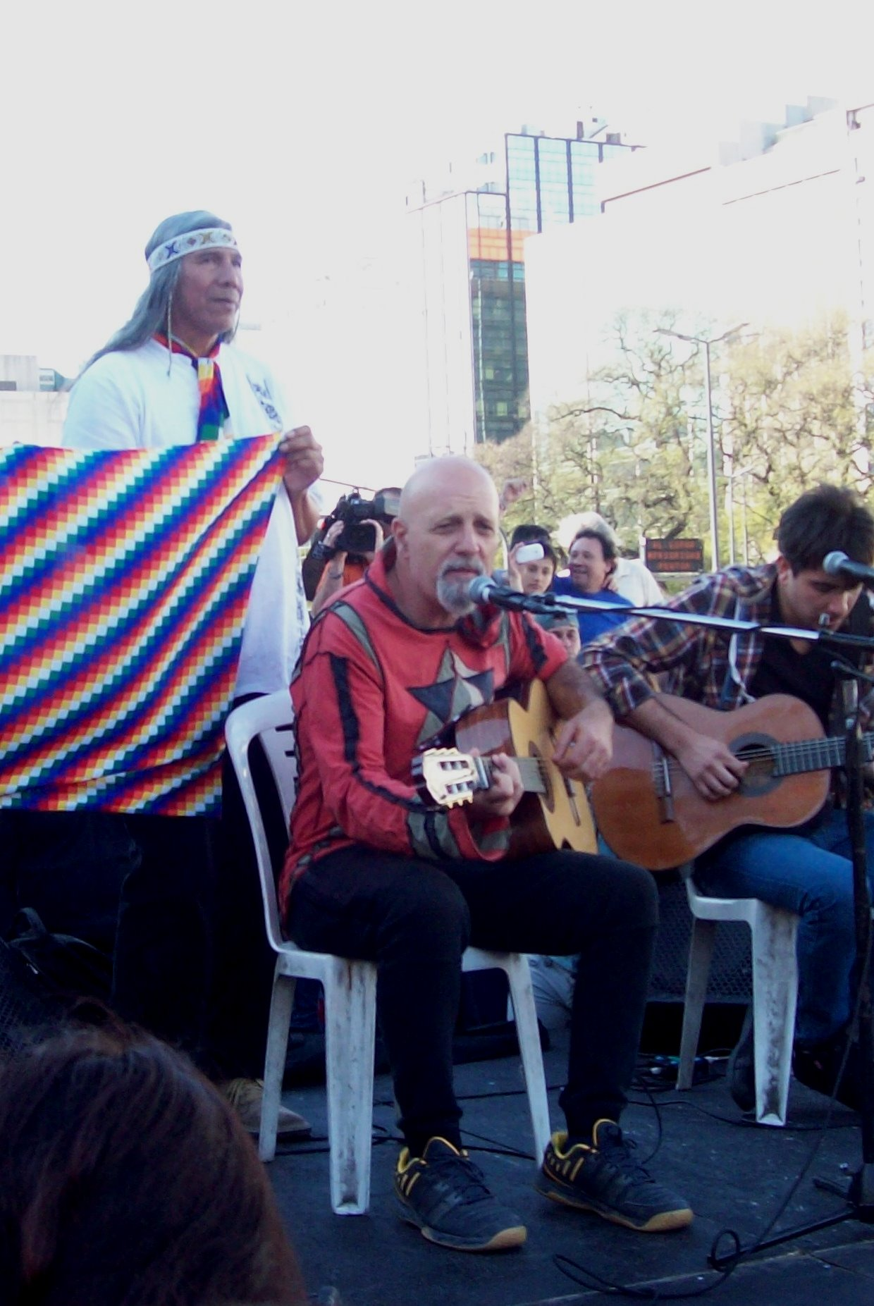 El qarashé Félix Díaz de los Qom junto a Gustavo Cordera en el acampe Qom en la Avenida 9 de Julio y Avenida de Mayo, en la ciudad autónoma de Buenos Aires.